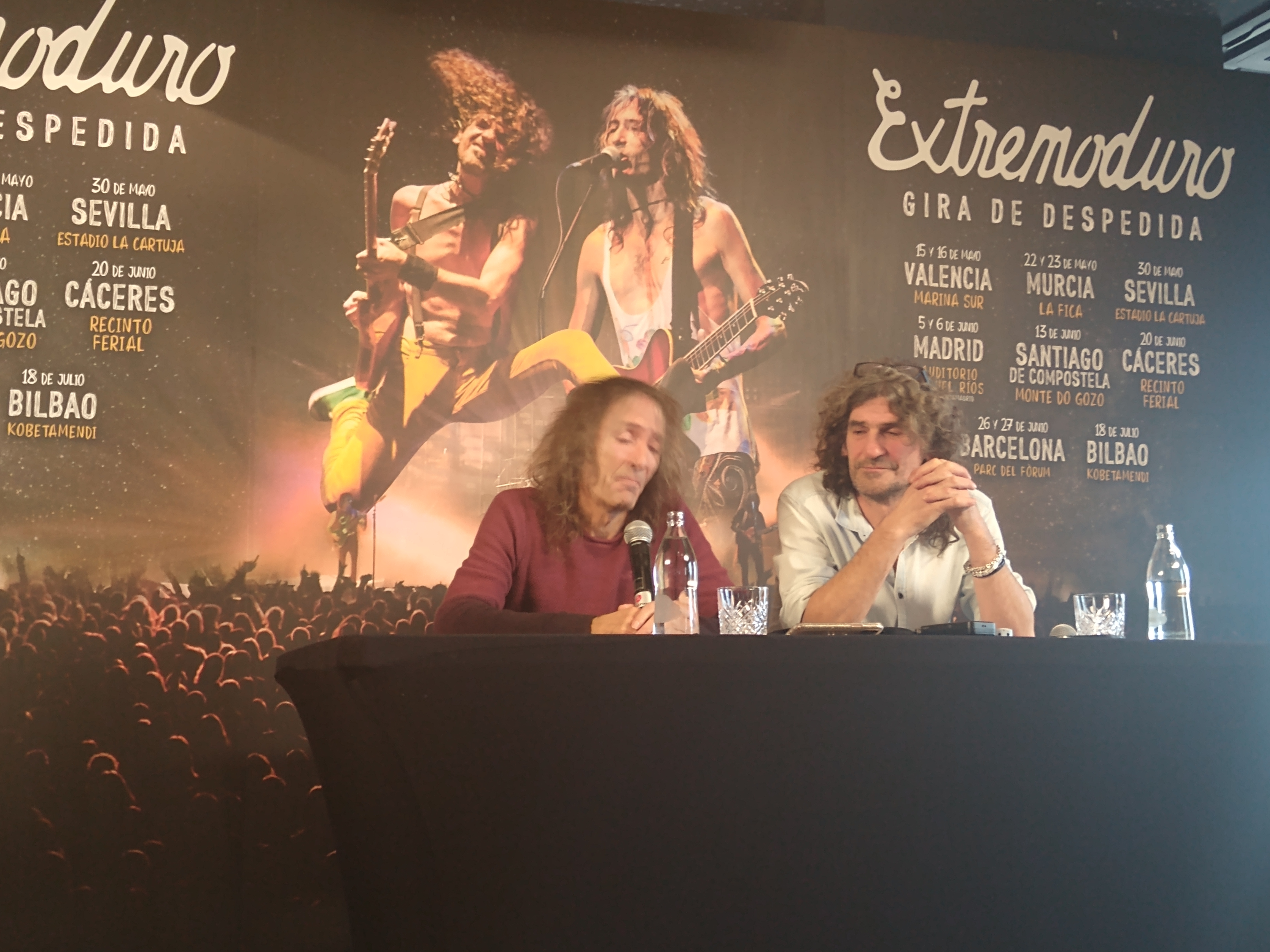 El grupo Extemoduro en la presentación de la Gira de despedida (19 de diciembre de 2019)